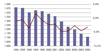 Población de Castilblanco (1994-2006).